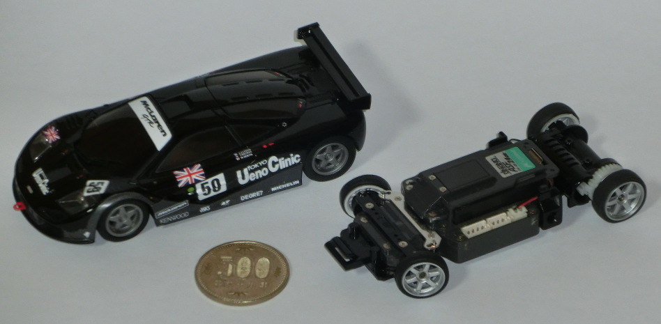 dNaNoのディスプレイ用モデルと走行用シャーシ